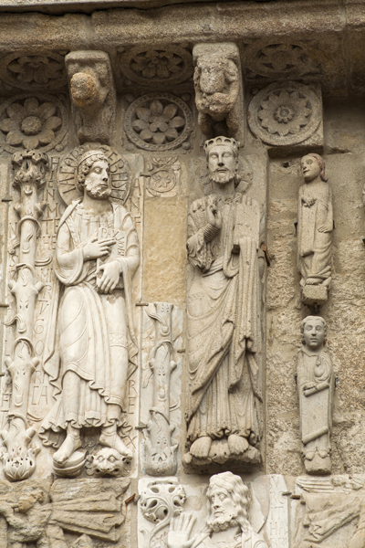 Cultural Heritage Spain RI-51-0000072